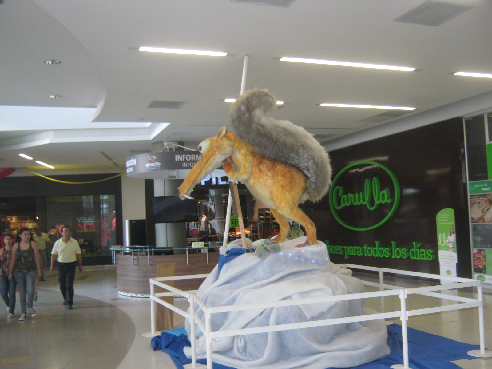 La ardilla de La Era del Hielo